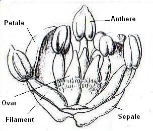 Zeichnung einer zwittrigen Blüte von T. fortunei